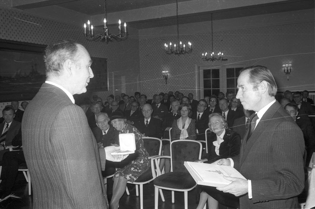 Der Dekan des Fachbereichs Agrarwissenschaften der Christian-Albrechts-Universität (CAU) Prof. Dr. Gerhard Geisler (links) überreicht dem Pflanzenzüchter Dr. Carl-Ernst Büchting (rechts) aus Einbek die Johann-Heinrich-von Thünen Medaille im Kieler Yacht-Club (KYC).